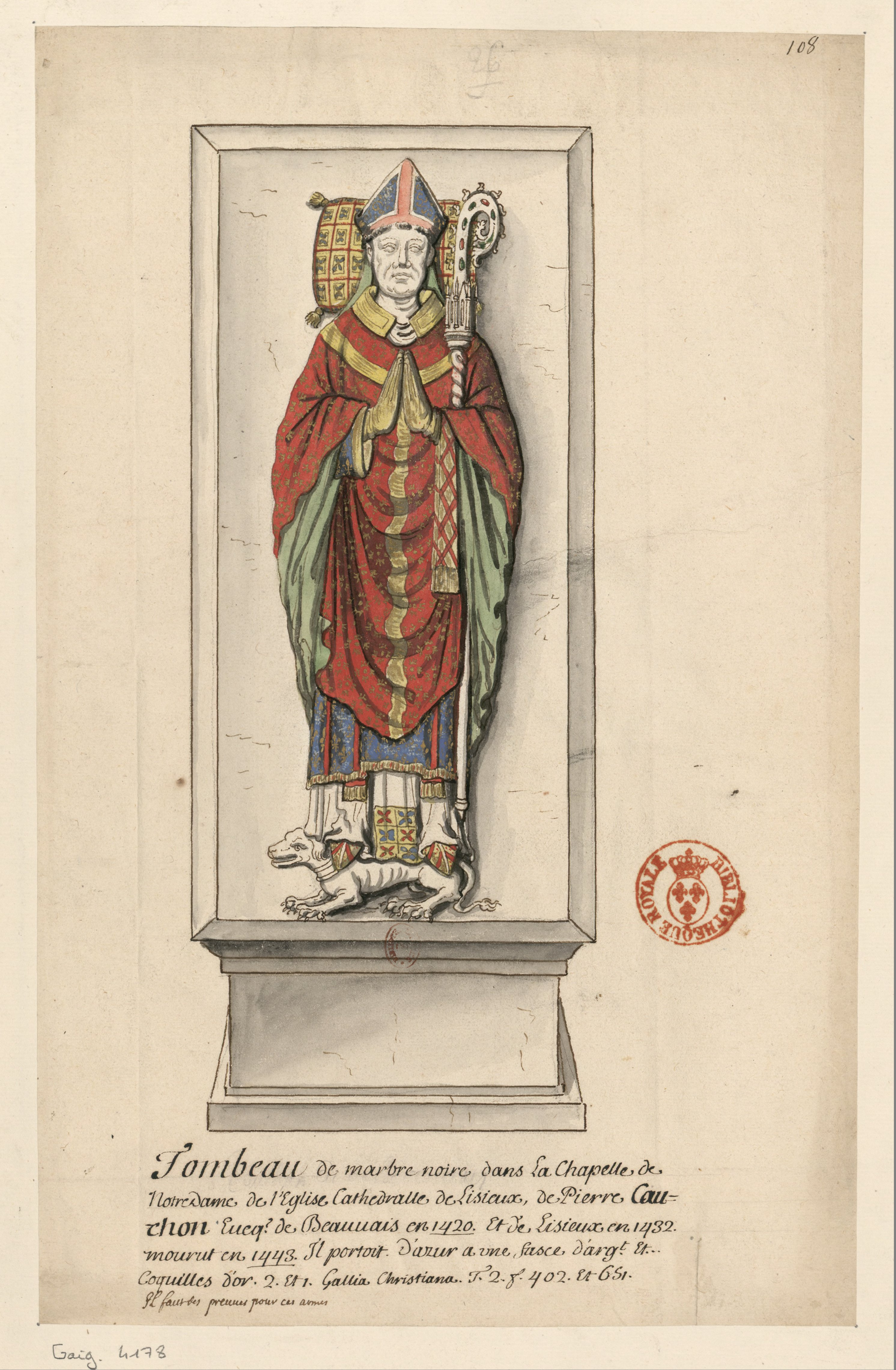 Tombeau en forme de socle vu à plat, sur lequel est couchée la statue peinte d'un prélat mitré et crossé